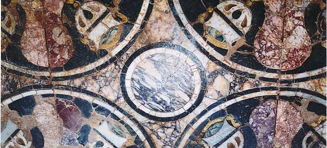 Мозайка в Софрониевата базилика, Никити, Гърция.